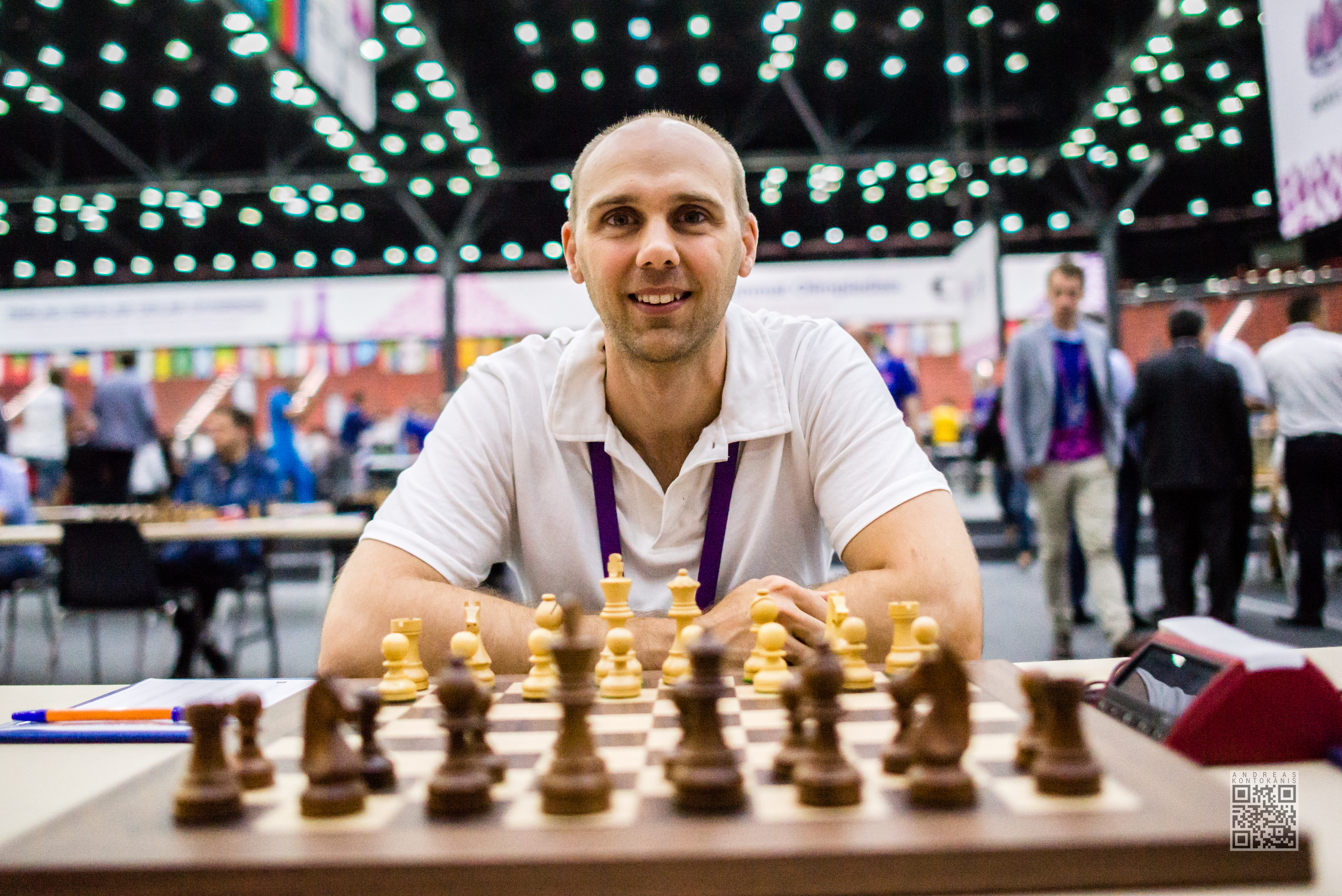 Smerdon David